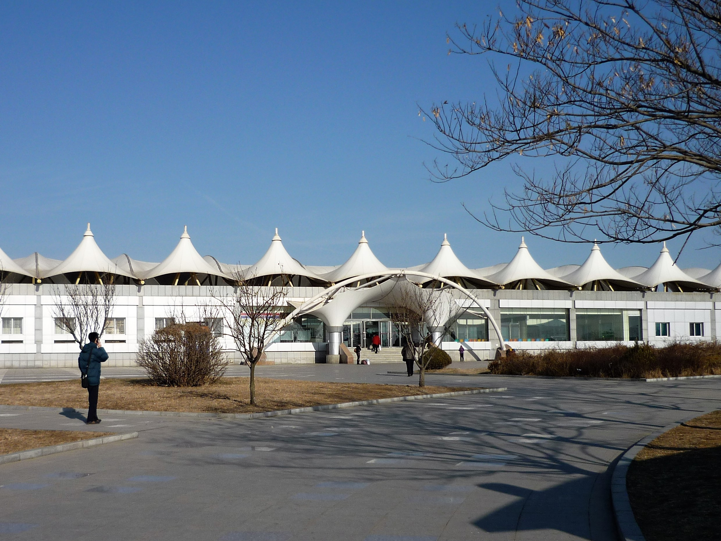 大連快軌3号線 金石灘駅（2009年1月撮影）